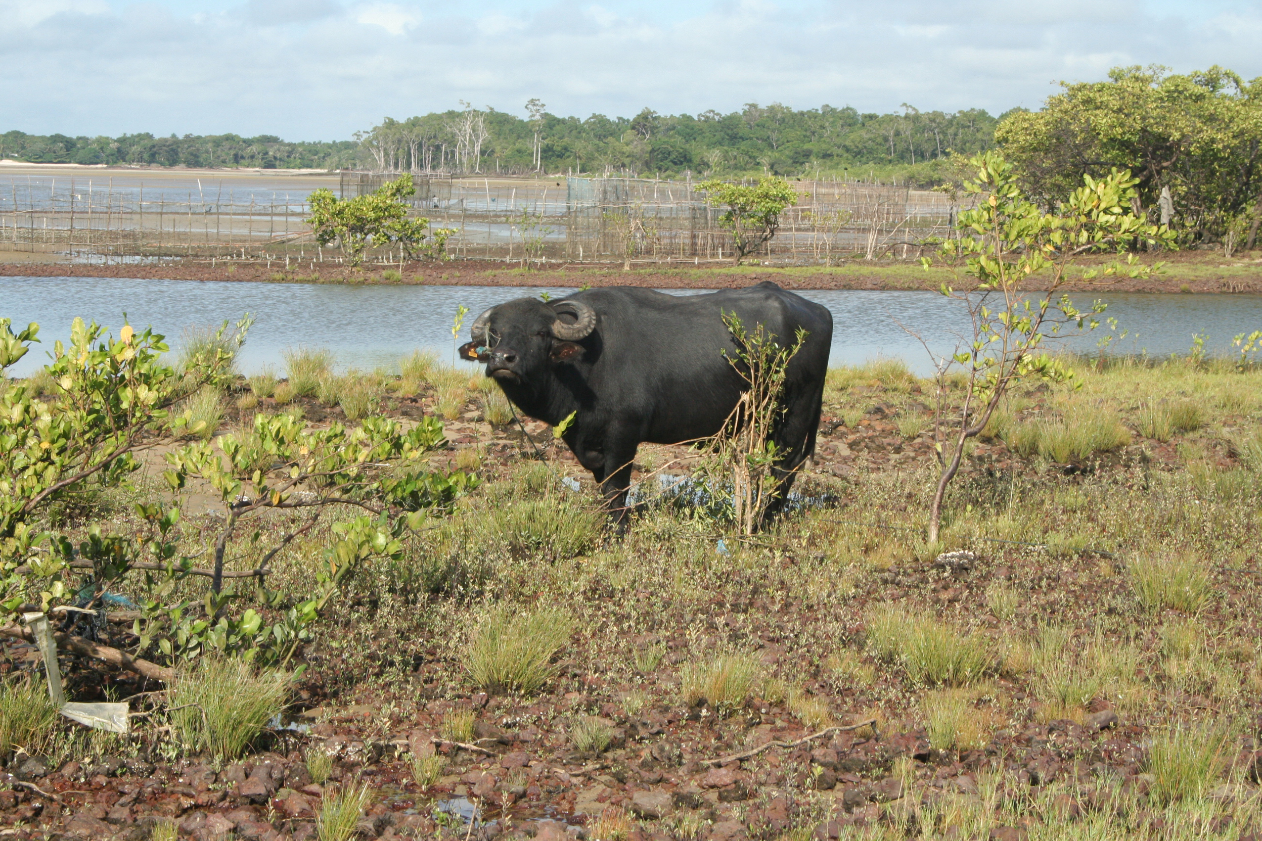 Aniam muito comum na região do Marajó. Apesar de sua imagem séria, este animal é bastante dócil quando devidamente domado e é um dos principais meio de transporte.